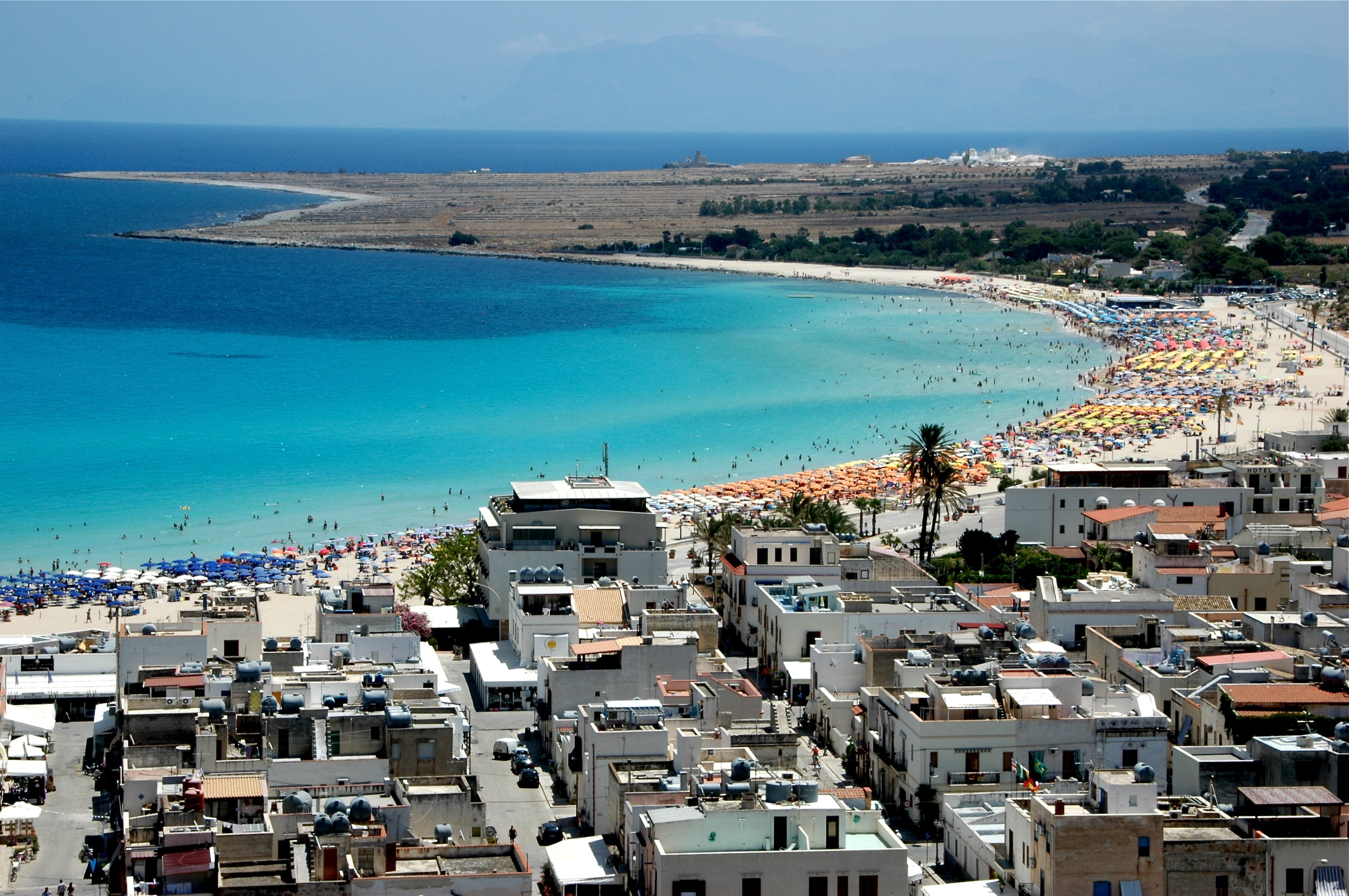 Sicilia giugno 2012